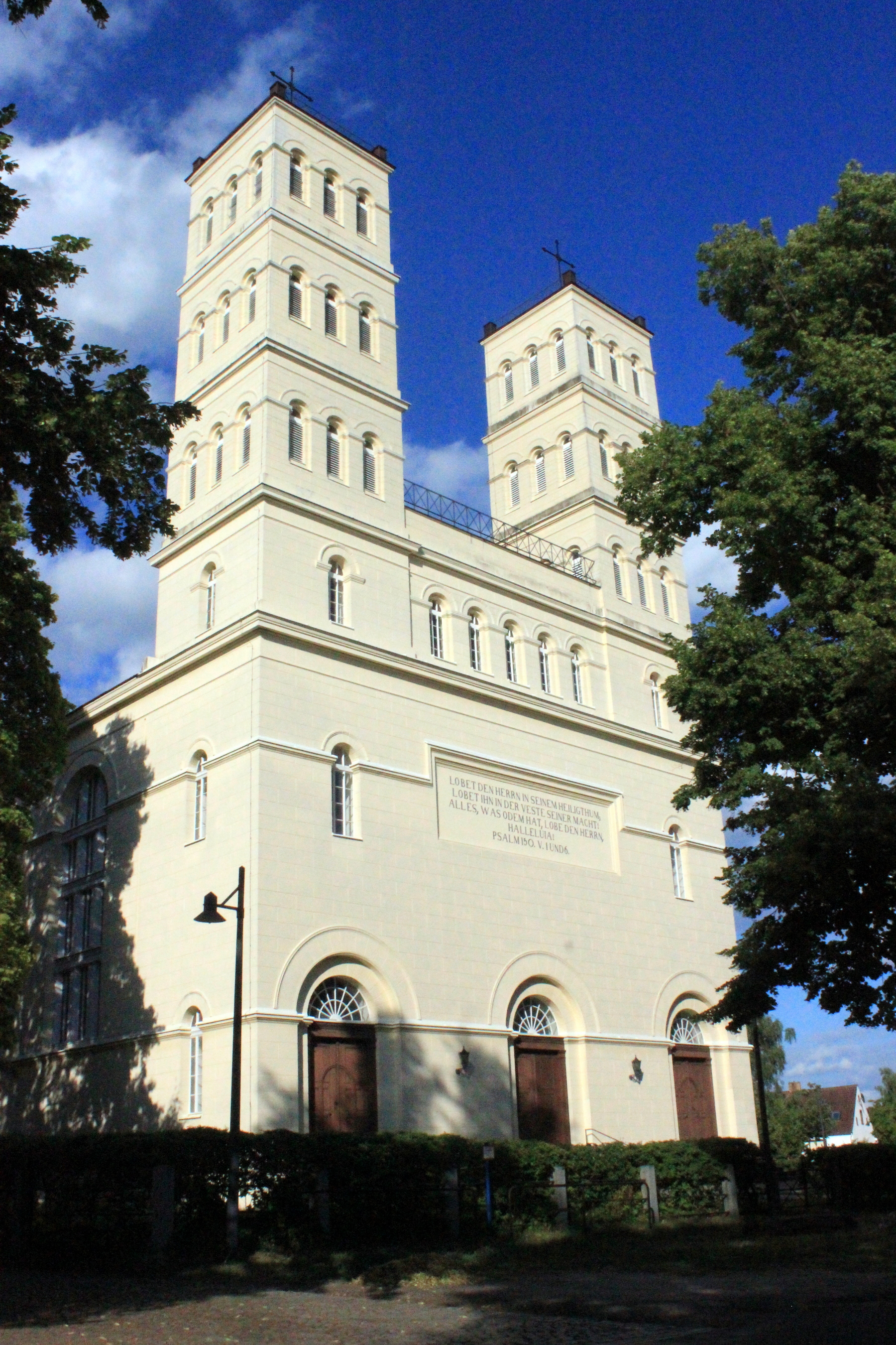 Hornjoserbsce: Cyrkej w Tšupcu.